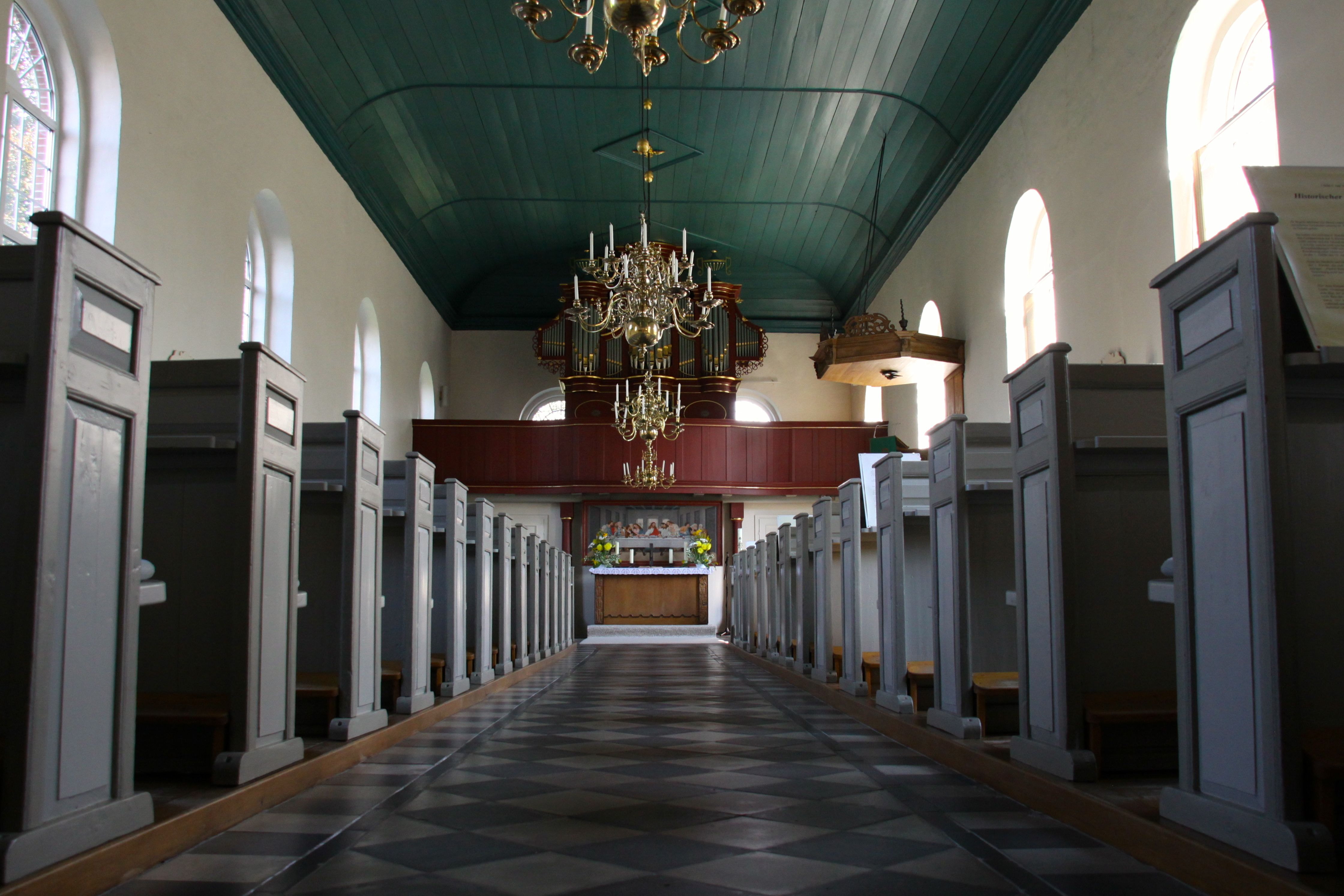 Blick ins Innere der St.-Stephani-und-Bartholomäi-Kirche (Detern)